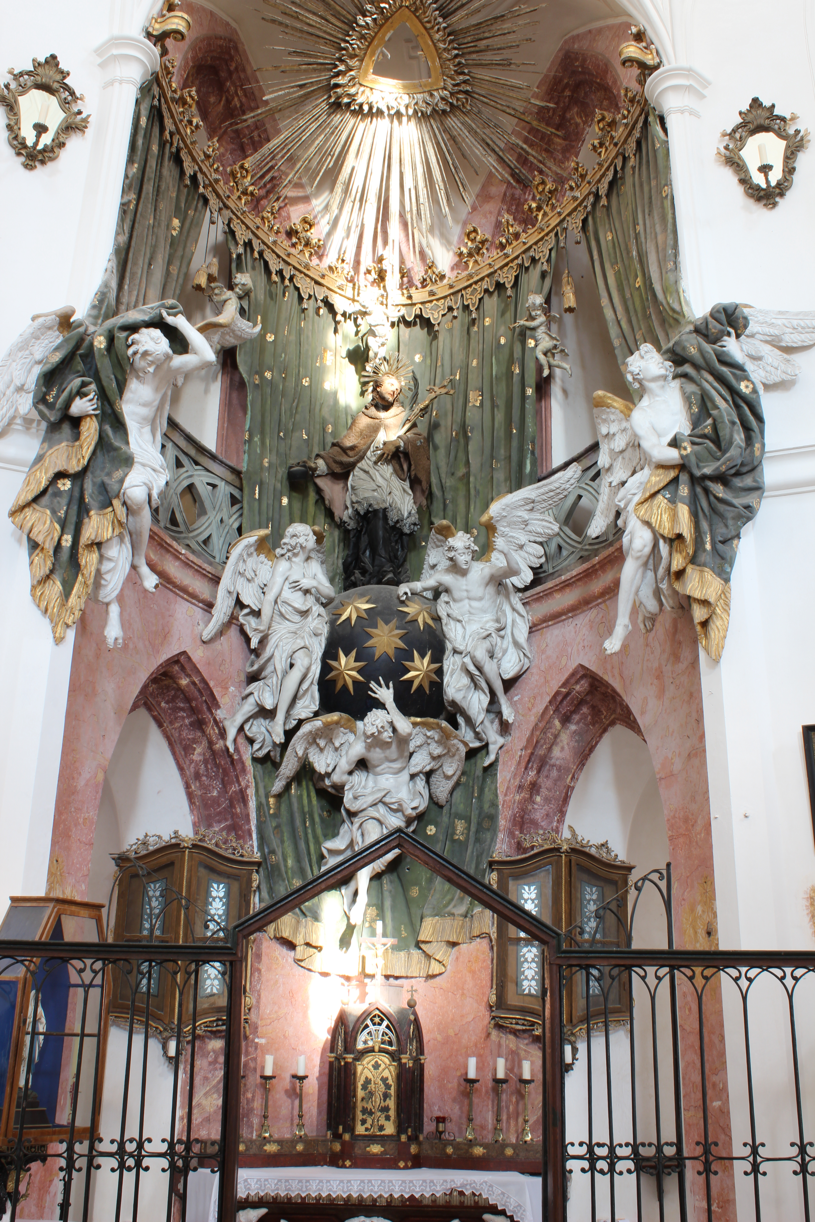 Poutní kostel sv. Jana Nepomuckého na Zelené hoře.